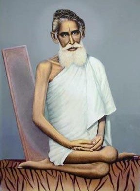 Baba Lokenath Brahmachari